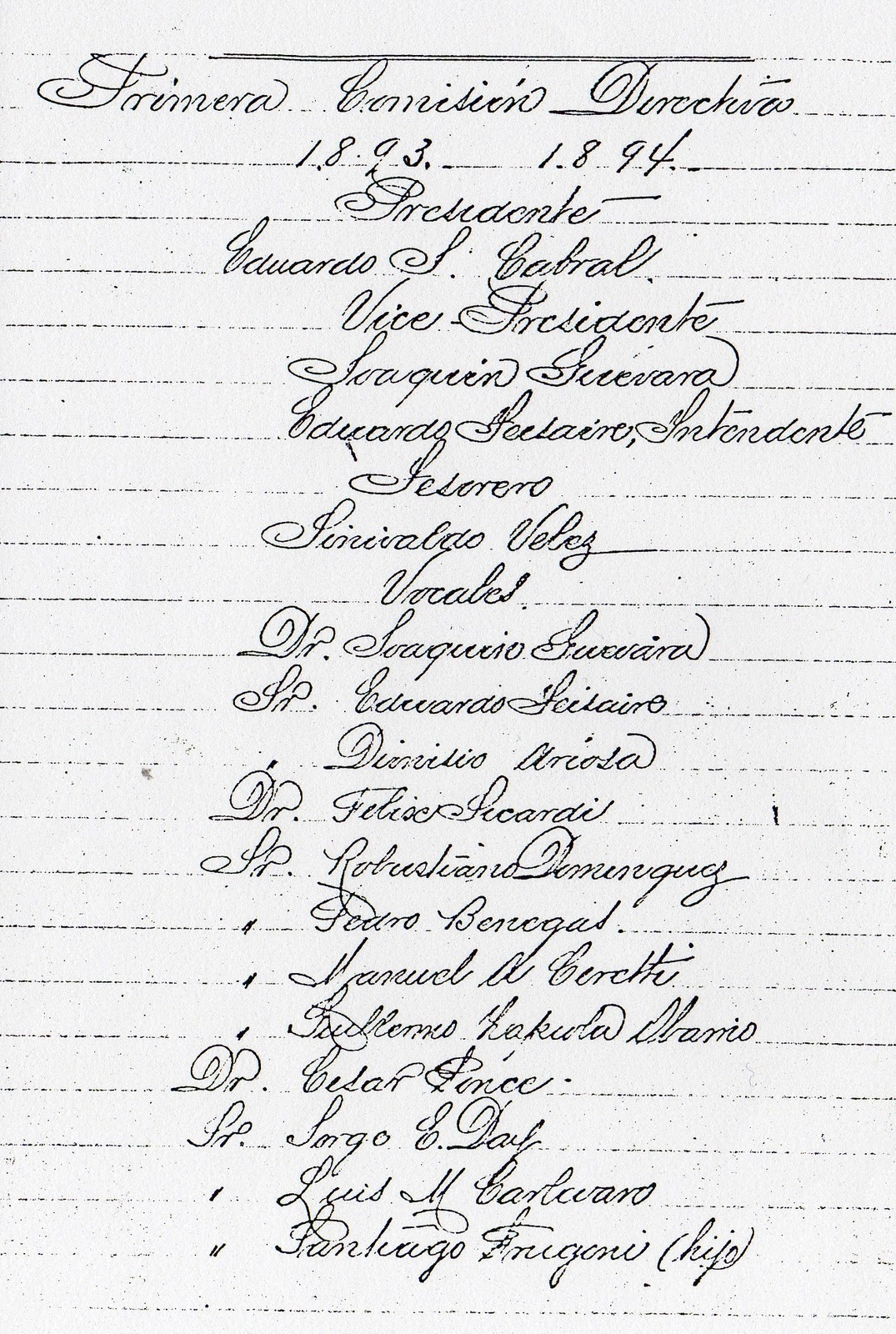 Acta de Asamblea Constitutiva del Club del año 1893